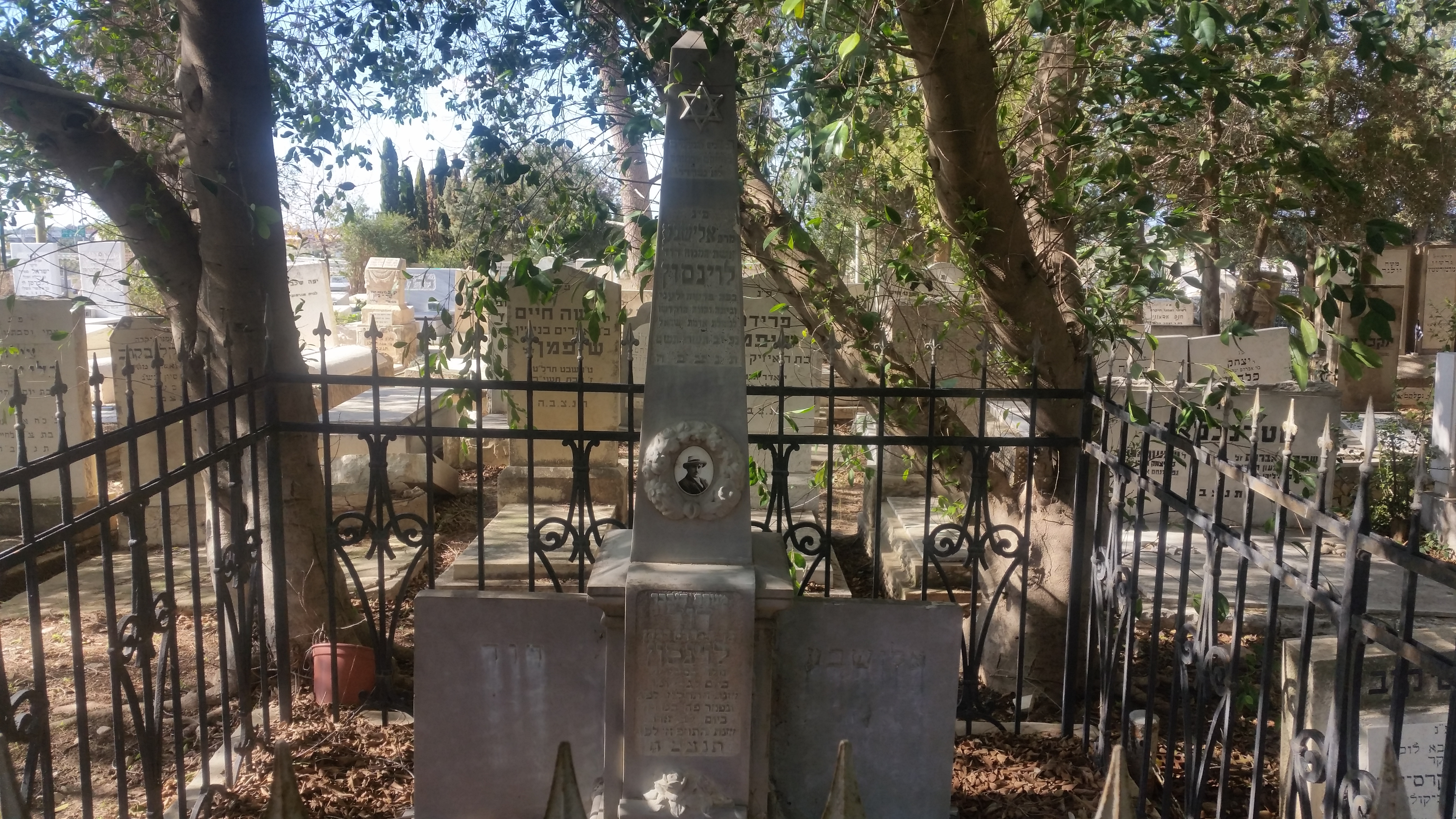 קבר אלישבע ודוד לוינסון בבית העלמין בגדרה